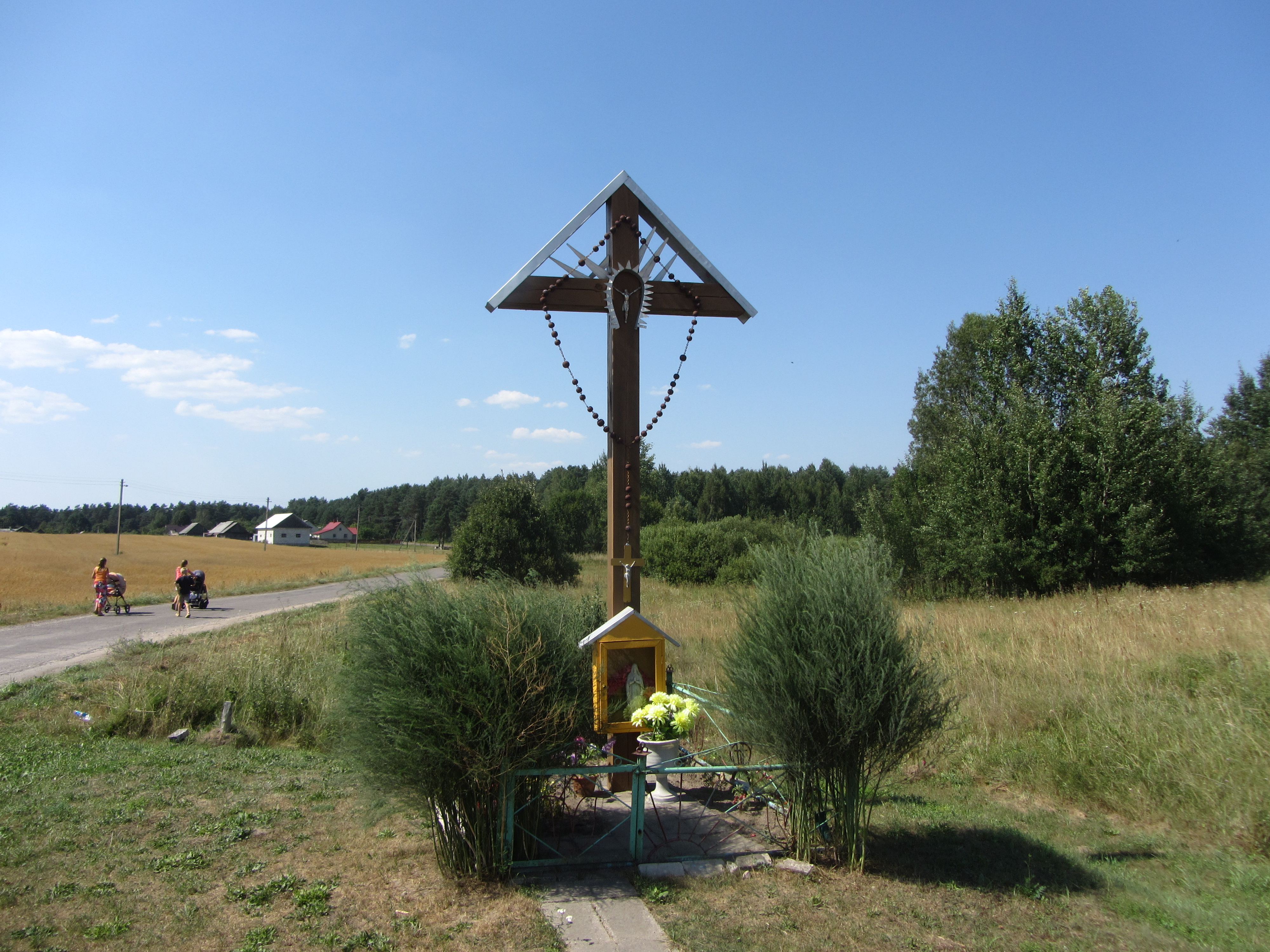 Didžiosios Sėlos, Lithuania